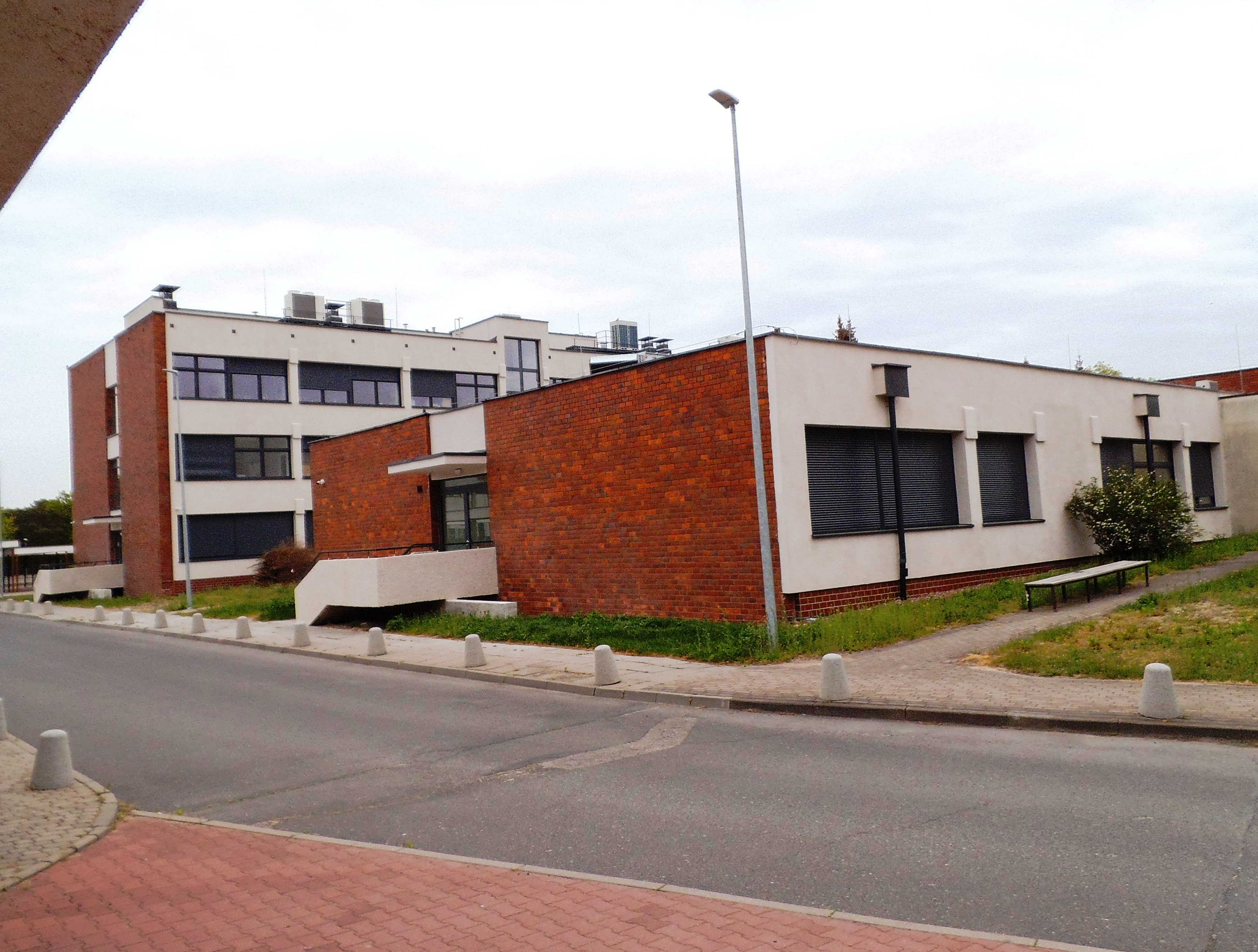 Budynek Instytutu Nauk Pedagogicznych UMK w Toruniu 1